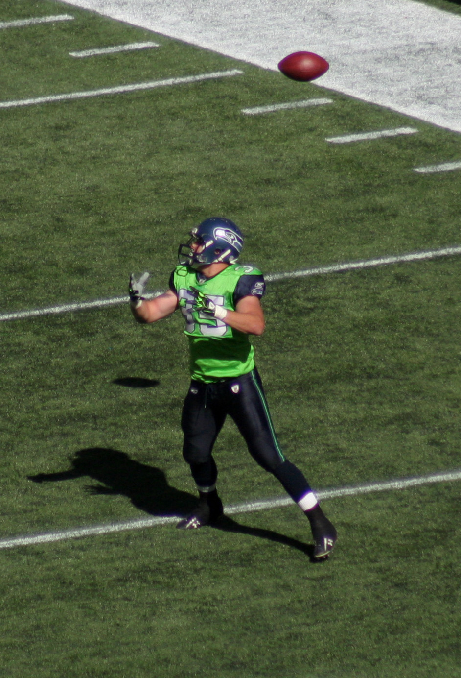 Owen Schmitt